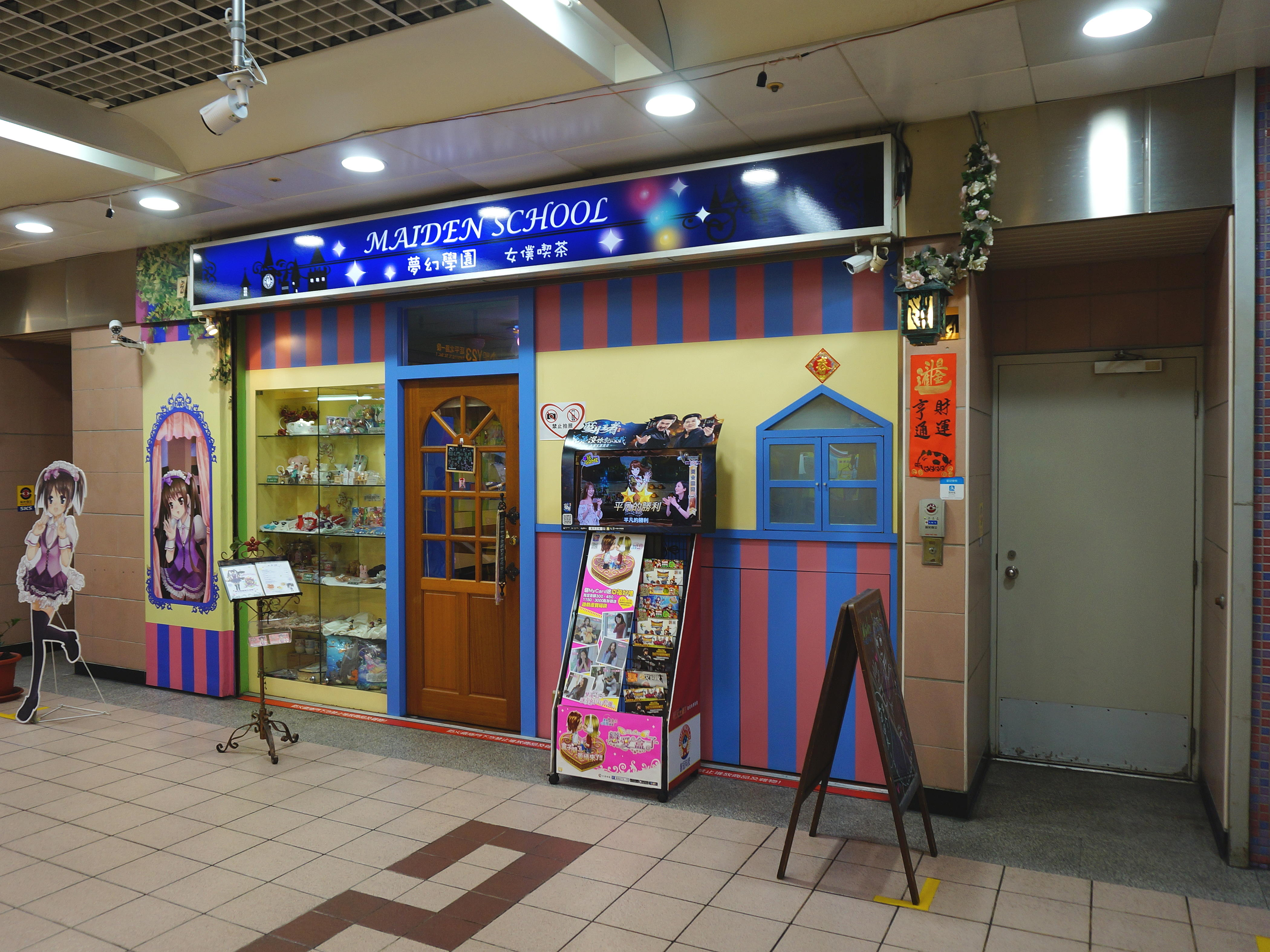 夢幻學園女僕喫茶，位於台北地下街3號店。